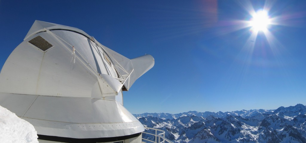 Coupole Tourelle (Lunette Jean Rösch), à l'Observatoire du Pic du Midi de Bigorre.